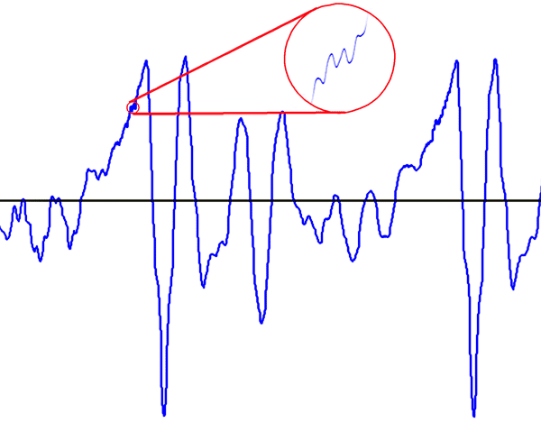 Ukázka spojitého signálu (cca 15ms dlouhý úsek zvukového záznamu hlásky "Á")